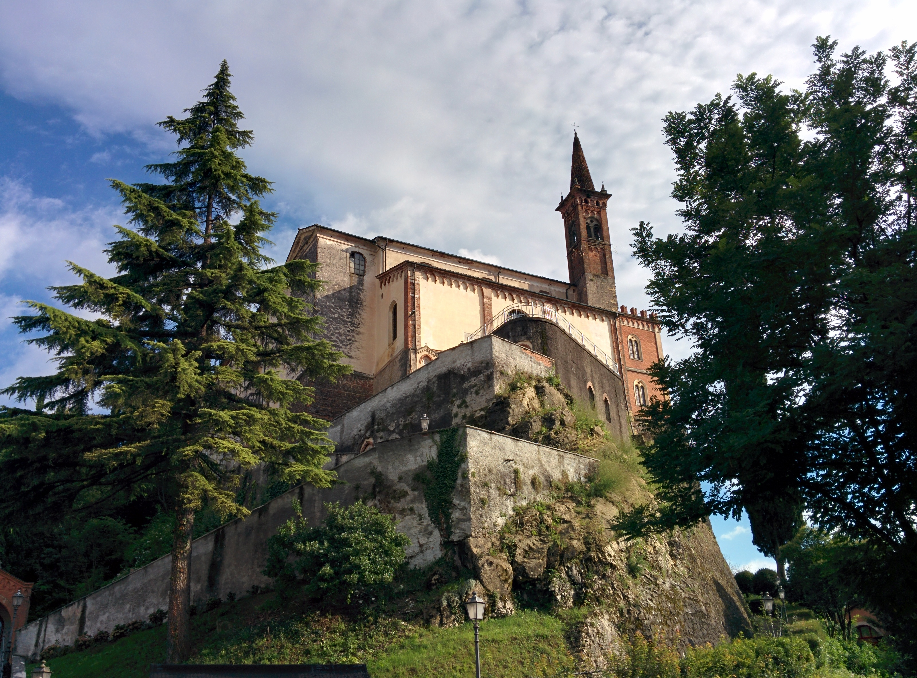 Convento di Santa Maria del Cengio ad Isola Vicentina, provincia di Vicenza. Vista da via Giarre.